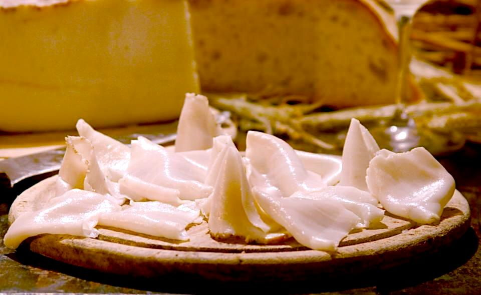 Il candido Lardo di Colonnata